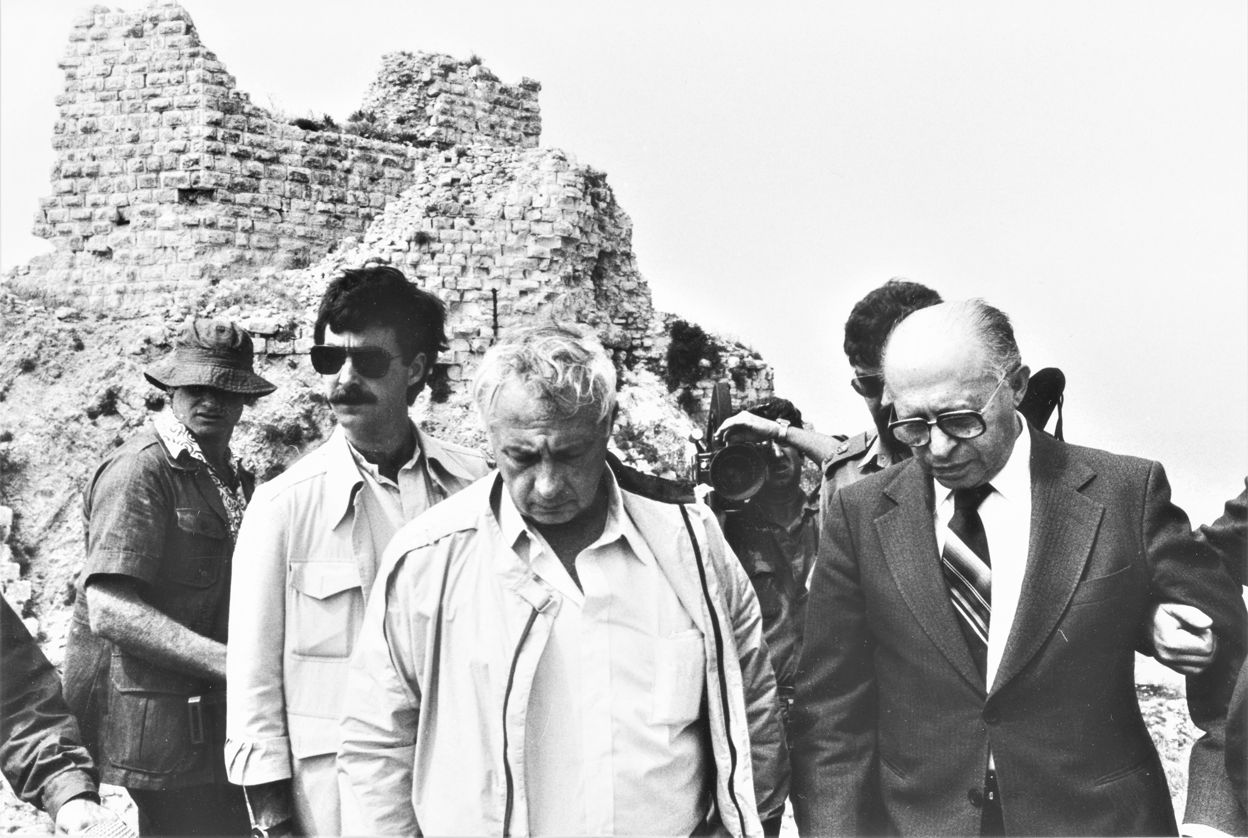 מנחם בגין, אריאל שרון ושלמה הרנוי במבצר הבופור לאחר כיבושו על ידי כוחות צה"ל במבצע שלום הגליל, מאחורי בגין (מימין) מזכירו הצבאי, עזריאל נבו